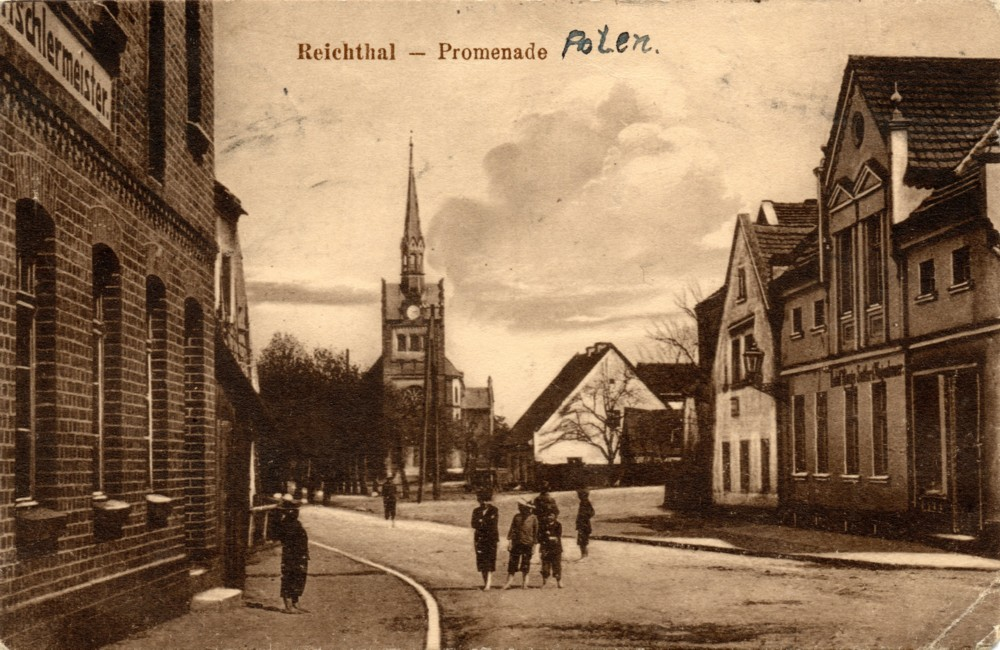 Promenda w Rychtalu ok. 1920.